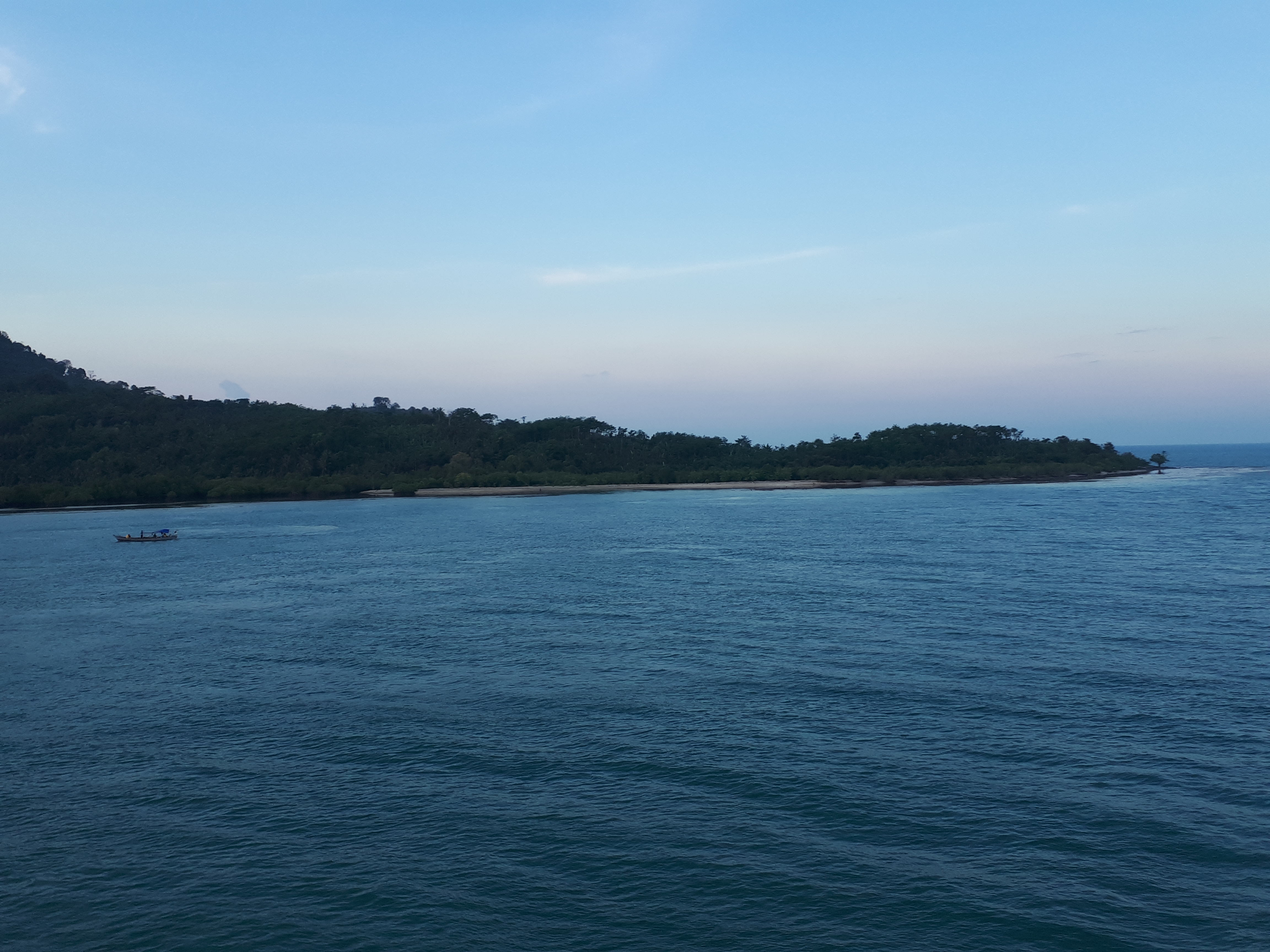 Pulau panjang yang membentang di Selat Sunda.